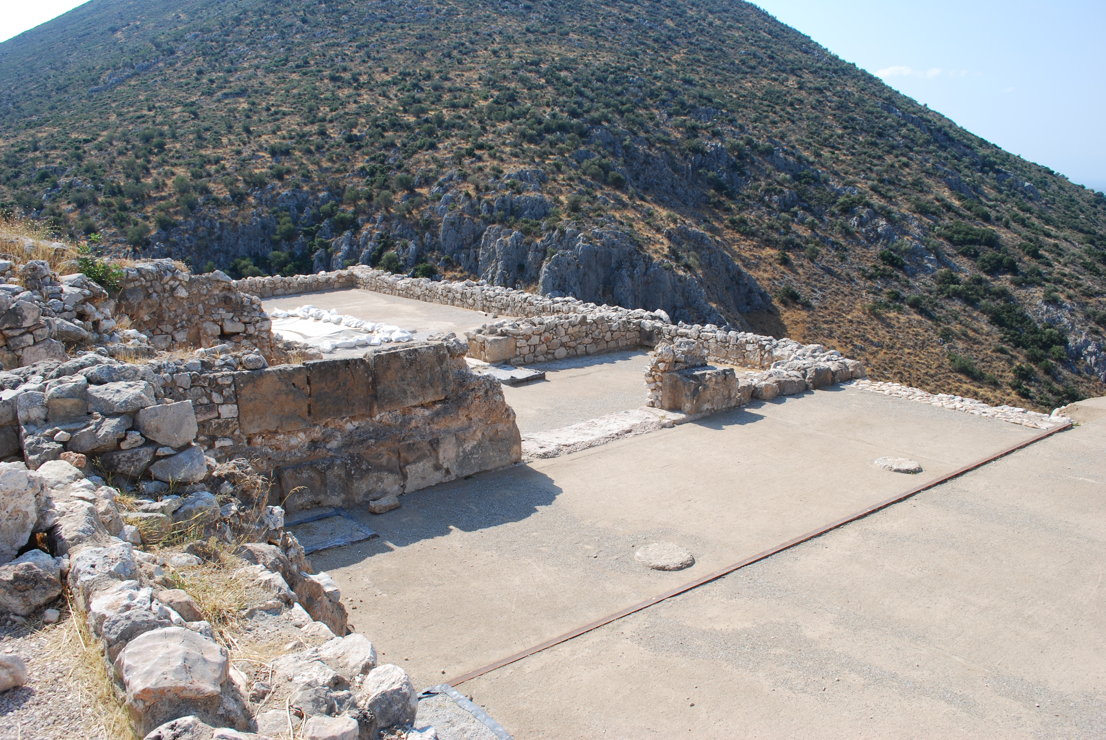 Mycènes : le megaron.